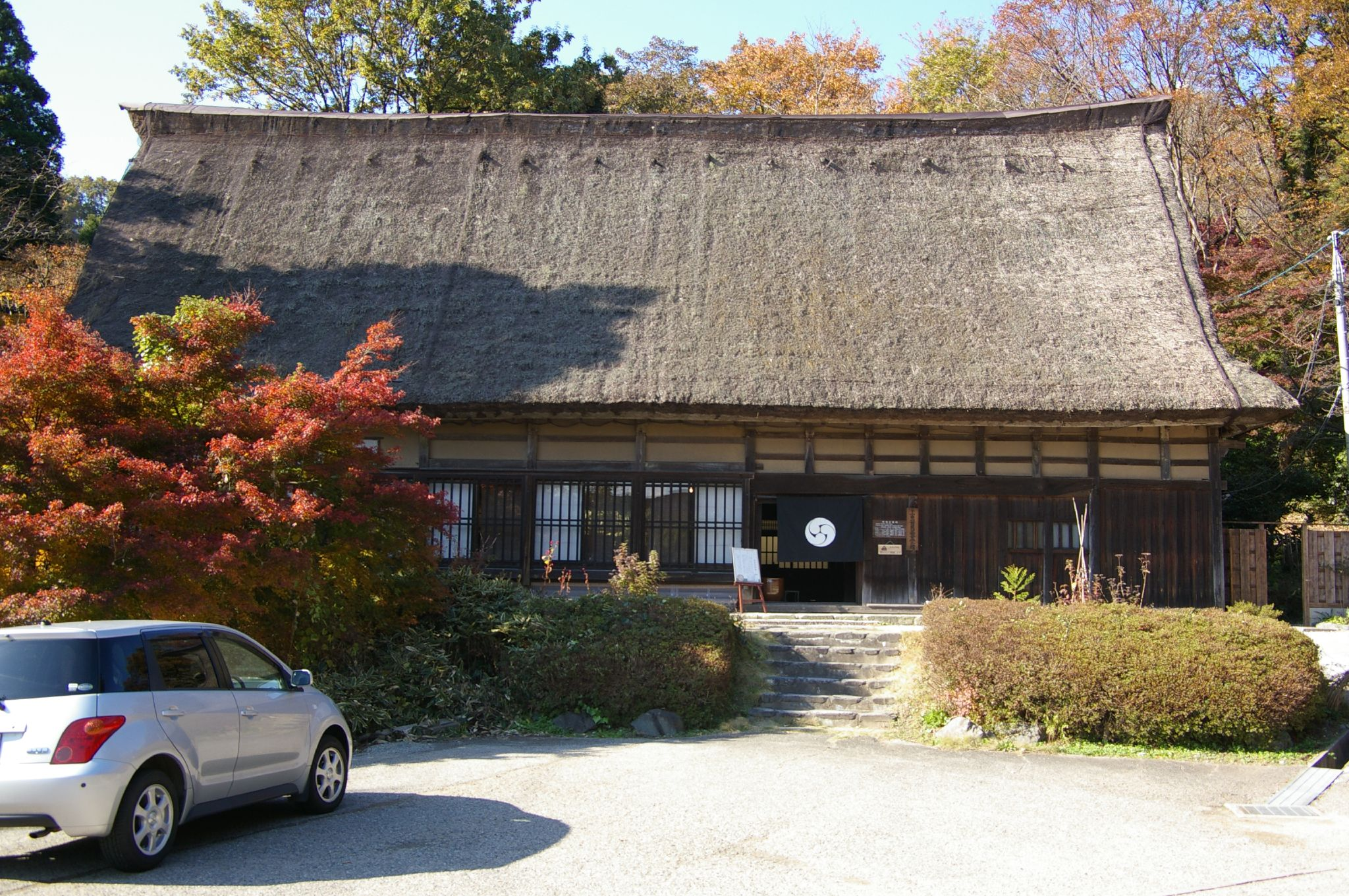 富山市民芸合掌館